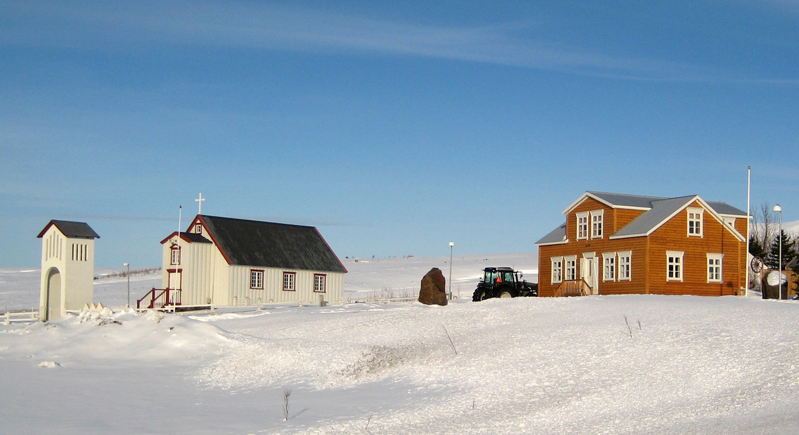 Vellir í Svarfaðardal, N-Iceland